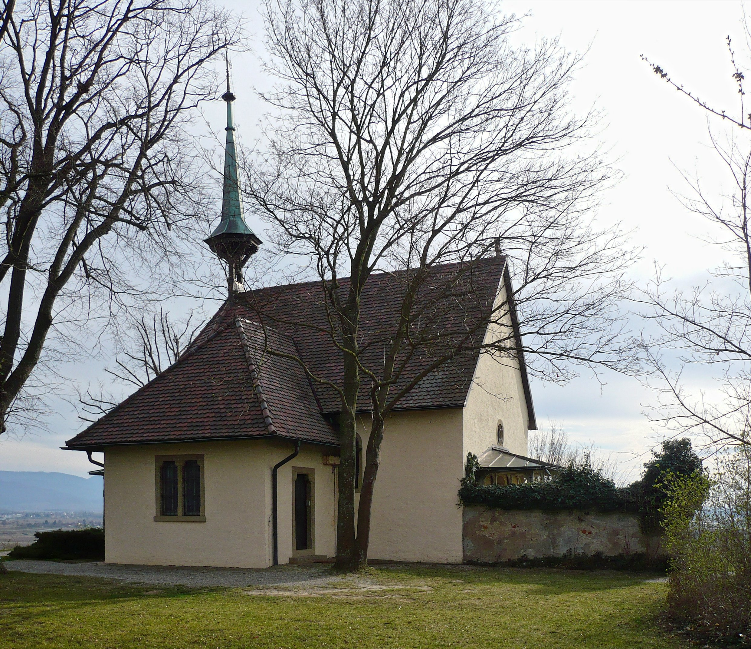 Erentrudiskapelle auf dem Tuniberg